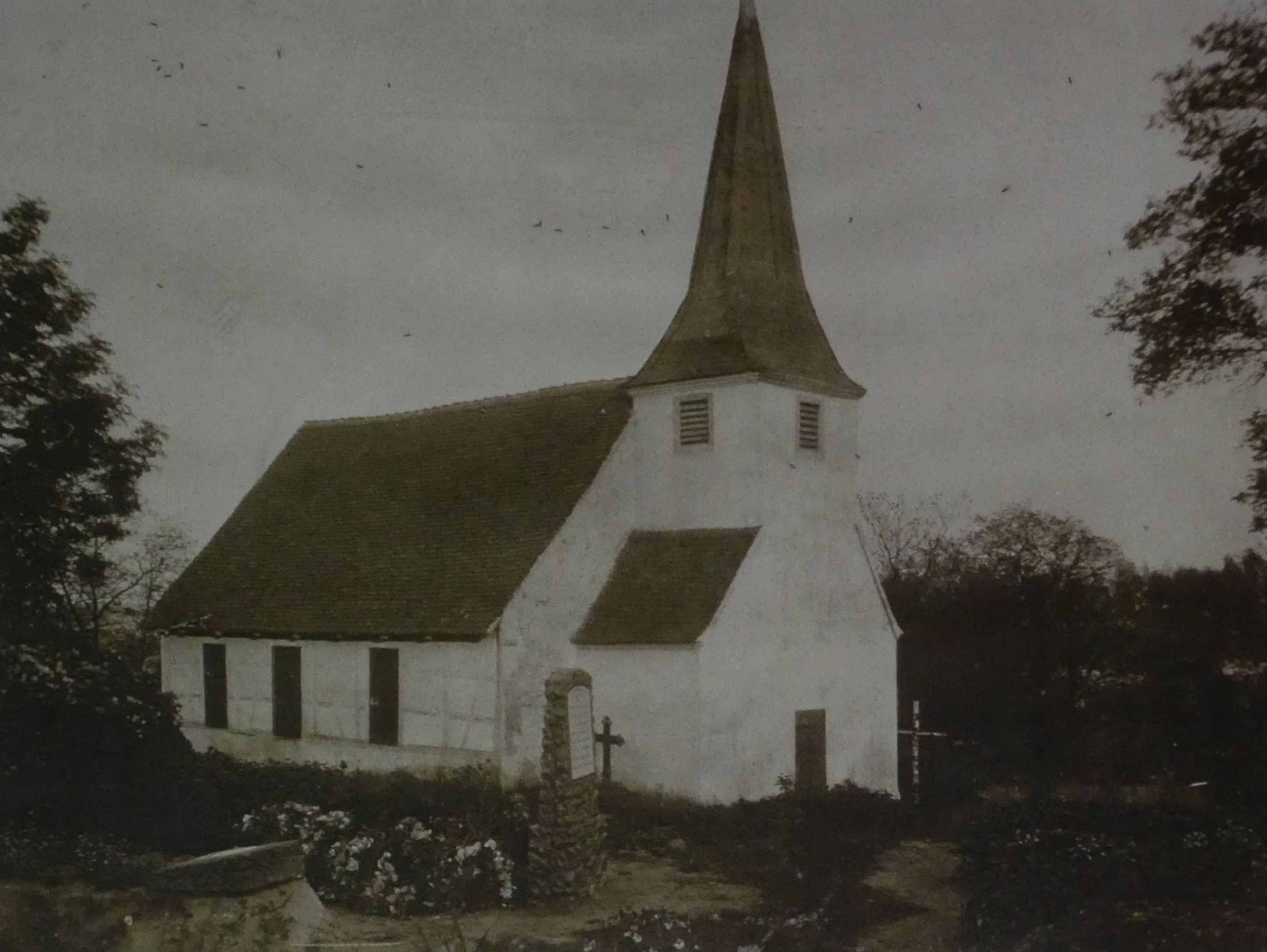 Foto der 1906 abgebrannten vormaligen Dorfkirche Bagow